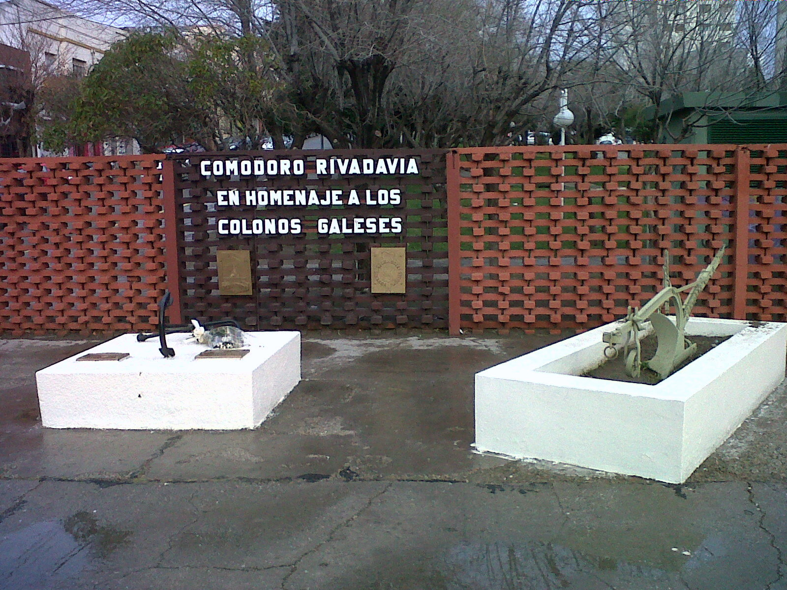 Monumento a la colonización galesa en el centro de Comodoro Rivadavia